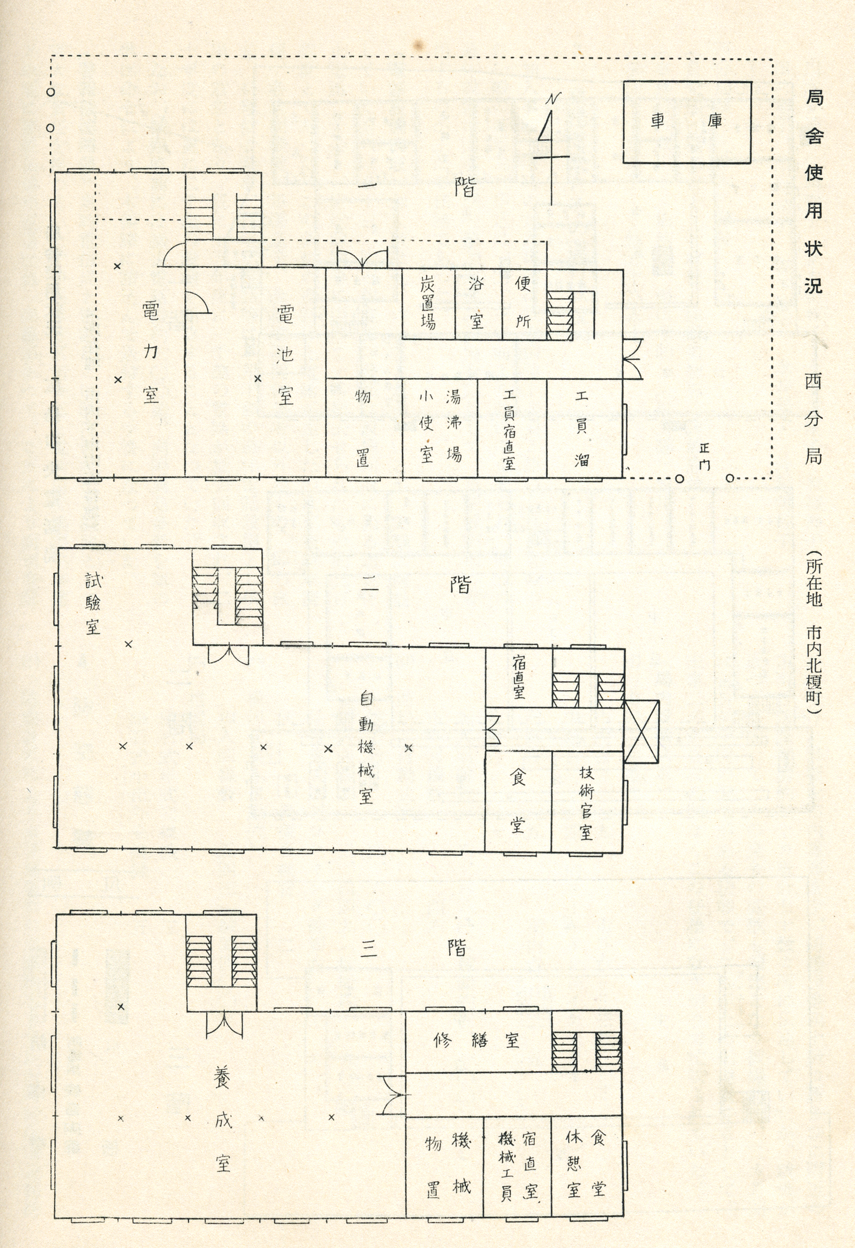 被爆直前の広島西電話局配置図